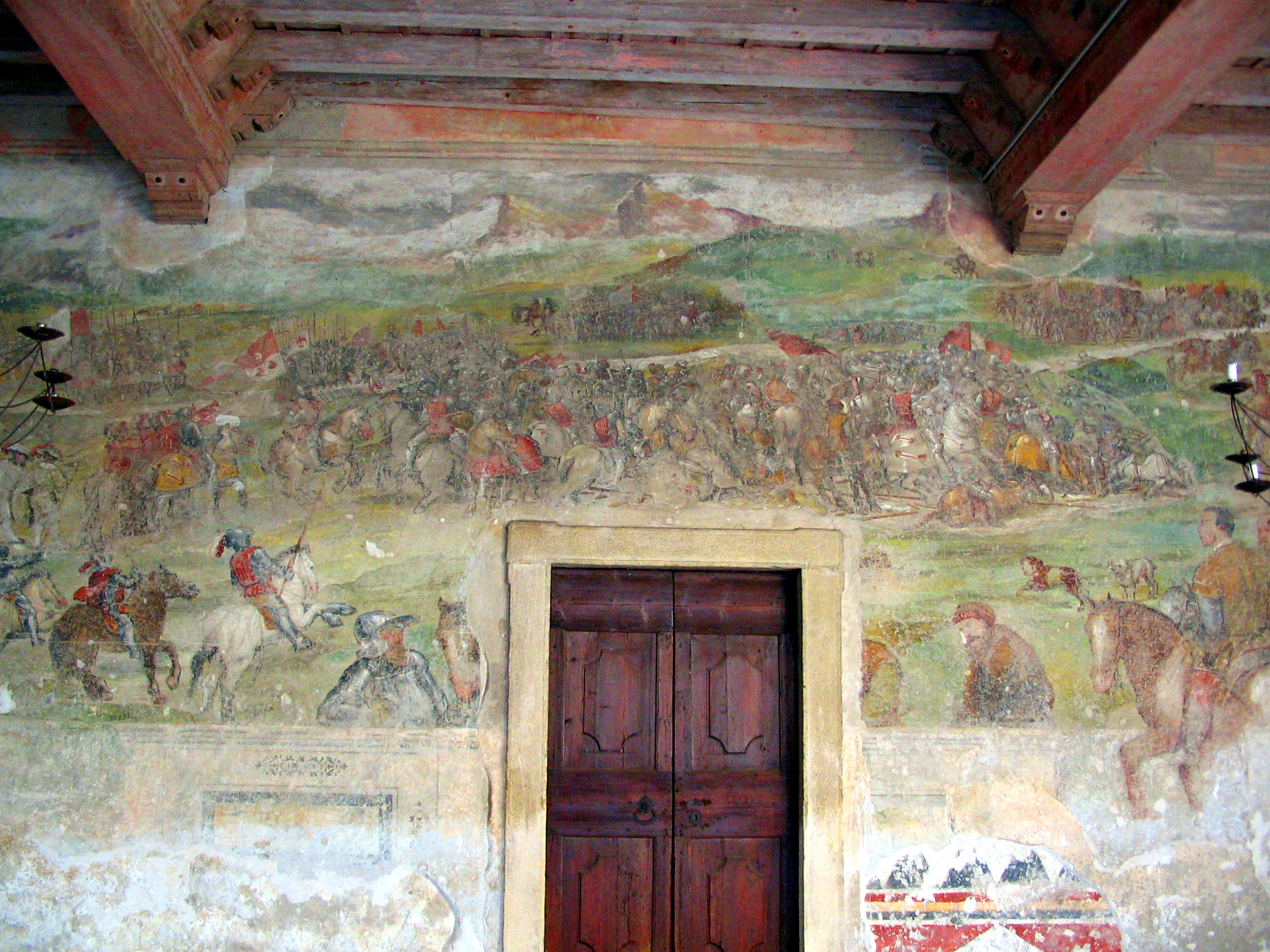 Il Romanino (attribuito a): La battaglia della Riccardina [1467]. Affresco nel Castello di Malpaga, già di Bartolomeo Colleoni. Foto di Giorces.